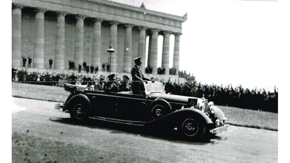 Адольф Гитлер. Посещение зала славы Вальхалла 6 июня 1937 года.